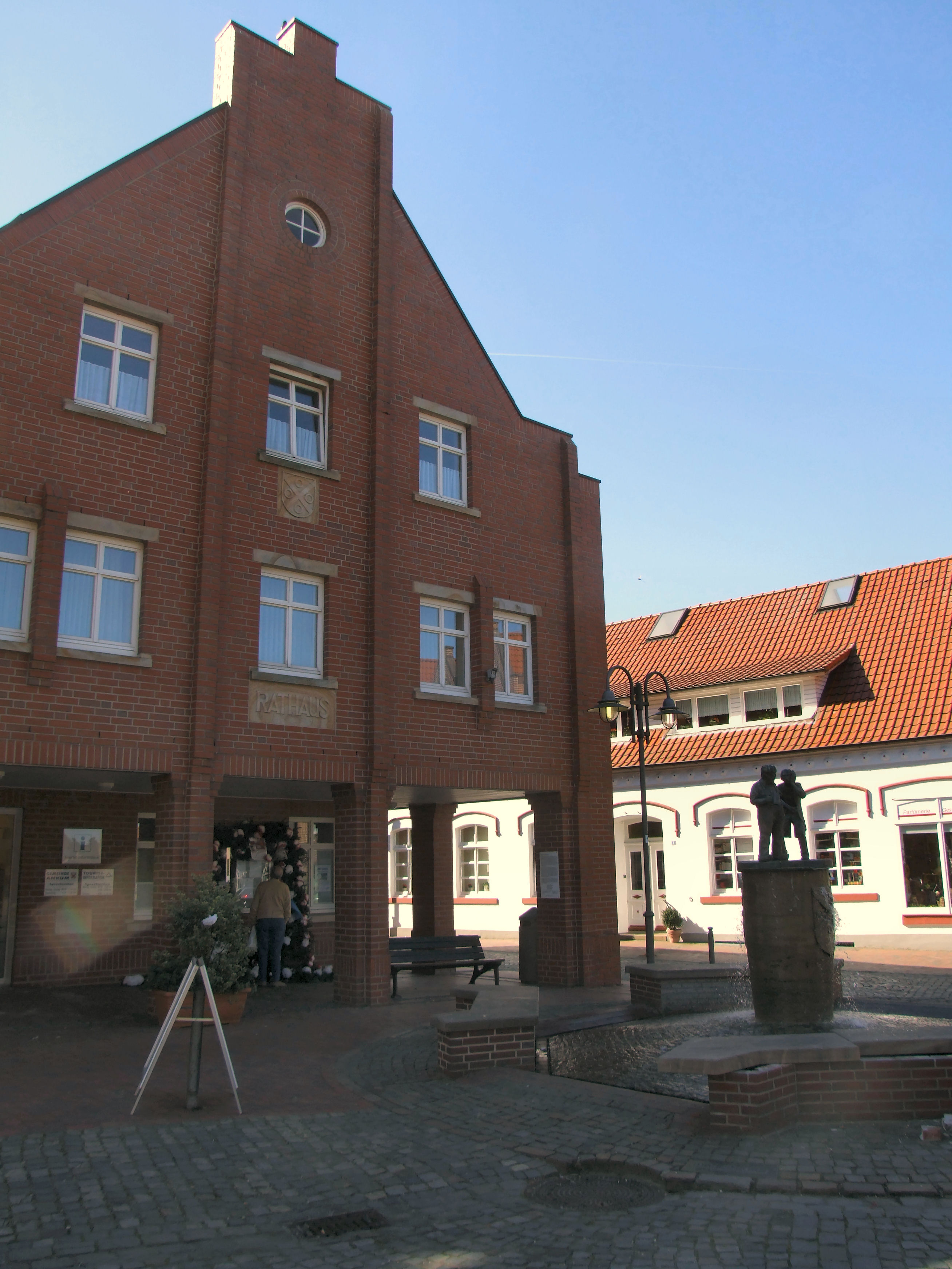 Das Rathaus zu Ankum